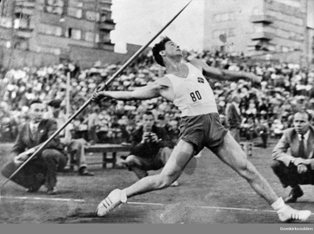 Egil Danielsen